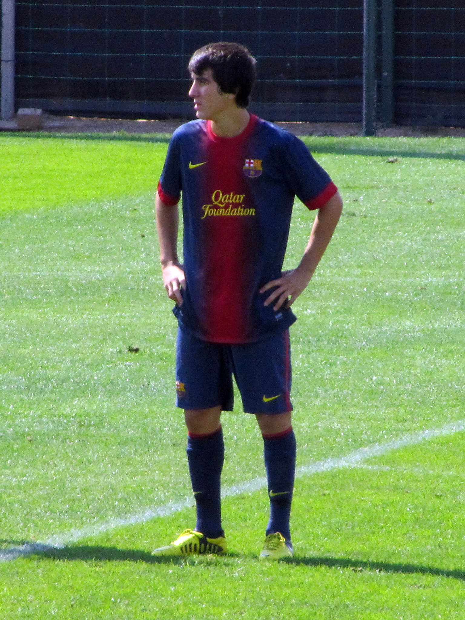 JJoel Huertas Cornudella in a 2012/13 FC Barcelona/FC Barcelona B home kit Foto realizada por Javier Segura (@castroquini)